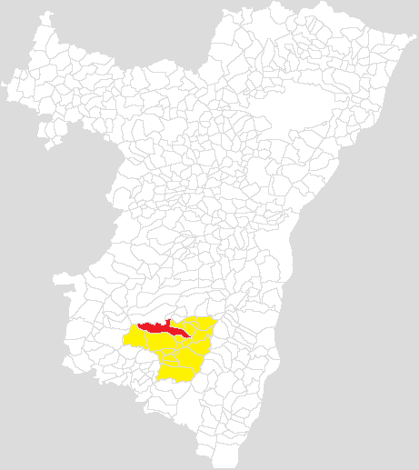 Communauté de communes Barr-Bernstein